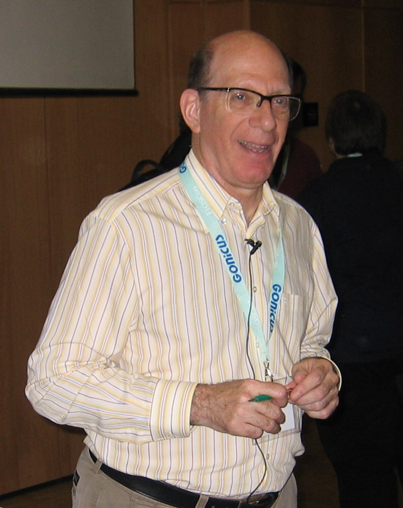 Andrew Tanenbaum auf der FrOSCon 2008 in Sankt Augustin